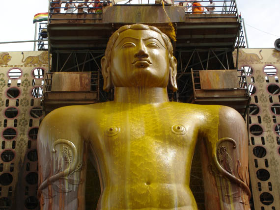 Satue de Gomateshvara, à Shravanabelagola (ville du sud de l'inde)Photo personnelle prise en juin 2006. Statue considérée par certains comme le plus grand monolithe taillé du monde.